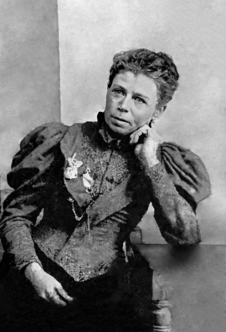 Alice Gray Jones (Ceridwen Peris) 1852-1943